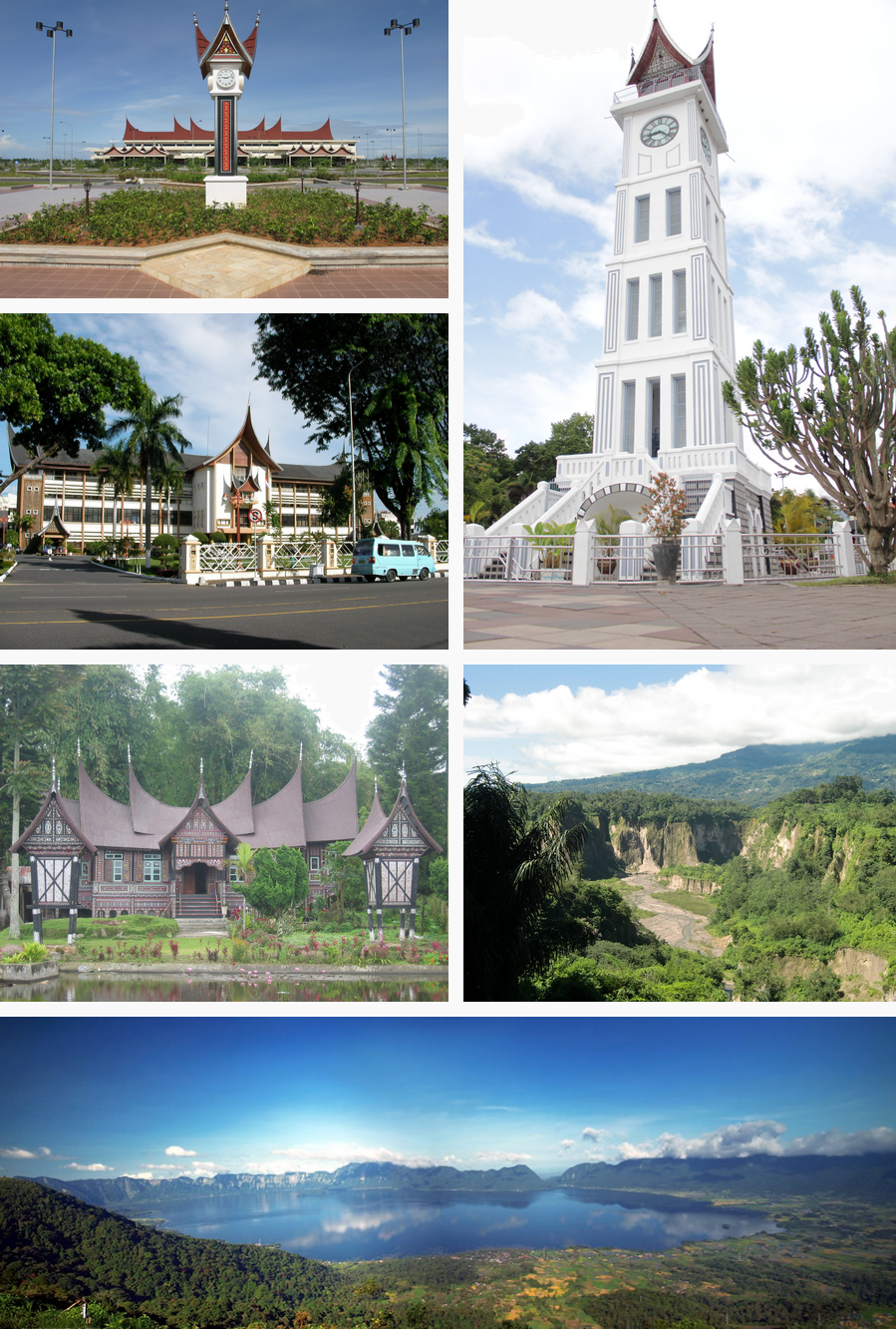 Dari kiri ke kanan: Bandar Udara Internasional Minangkabau, Jam Gadang, kantor gubernur Sumatra Barat, Rumah Gadang di nagari Pandai Sikek, Ngarai Sianok dan Danau Maninjau.